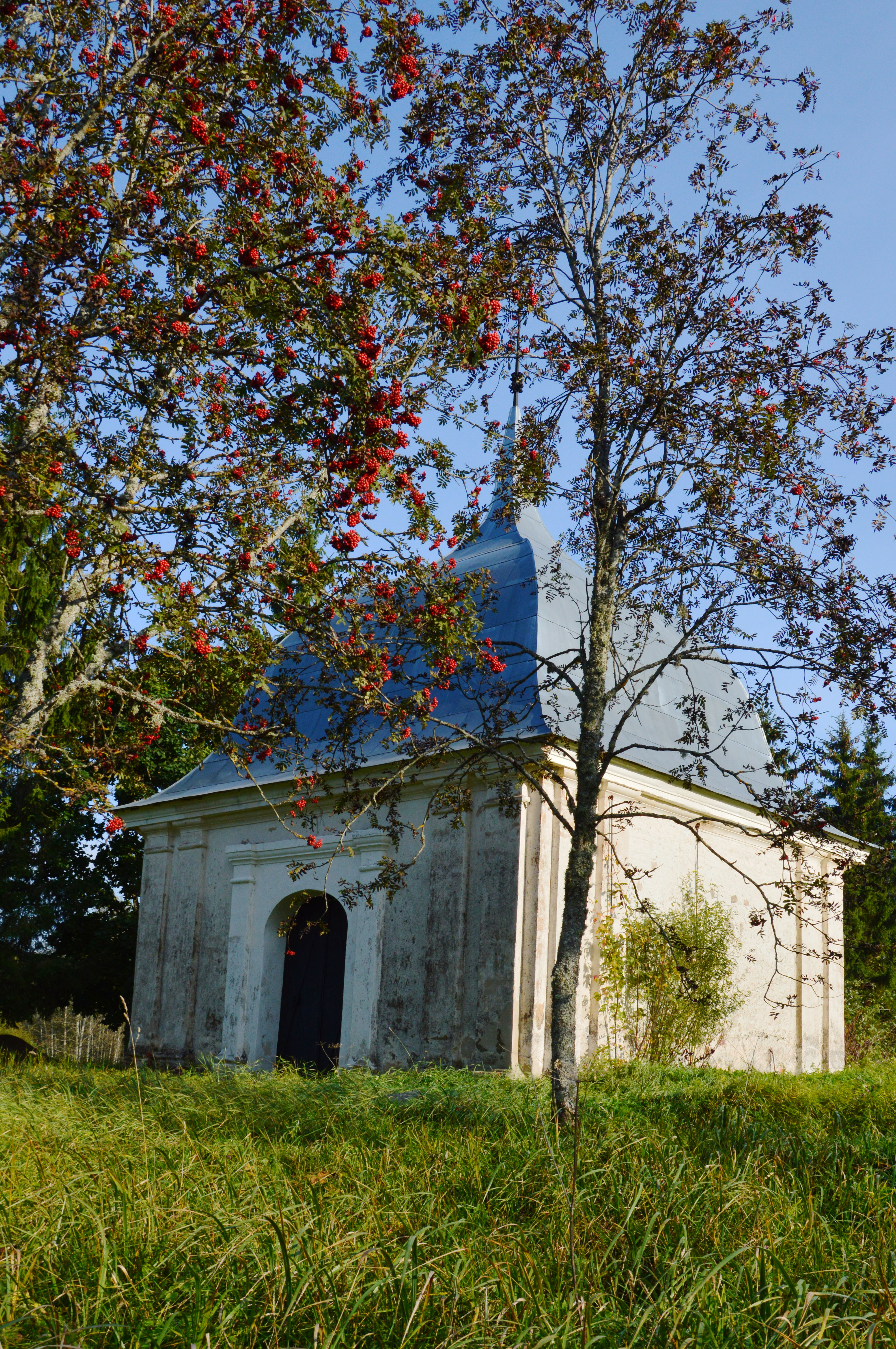 Vastseliina mõisa kabel